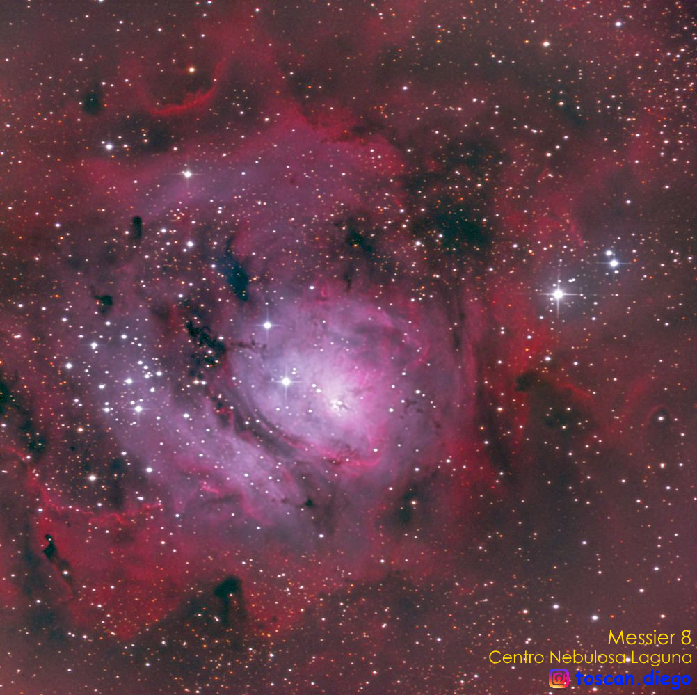 Centro Nebulosa de la Laguna